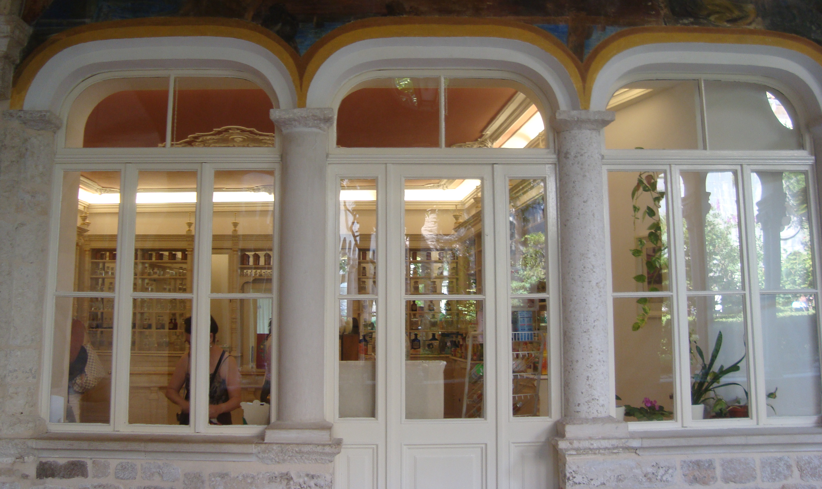 Vue de la pharmacie donnant sur le cloitre roman du monastère franciscain de Dubrovnik en Croatie